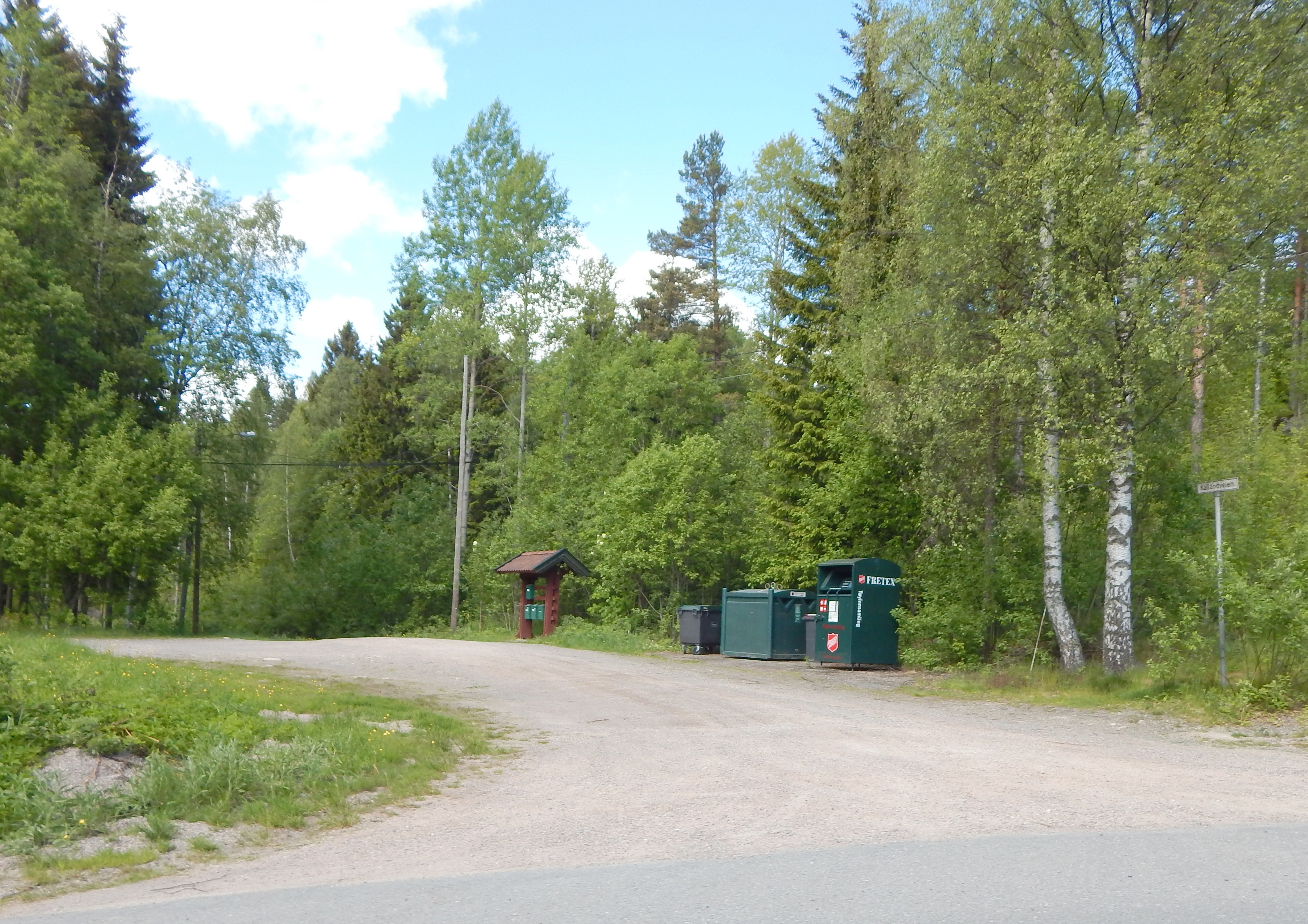 Kallandveien